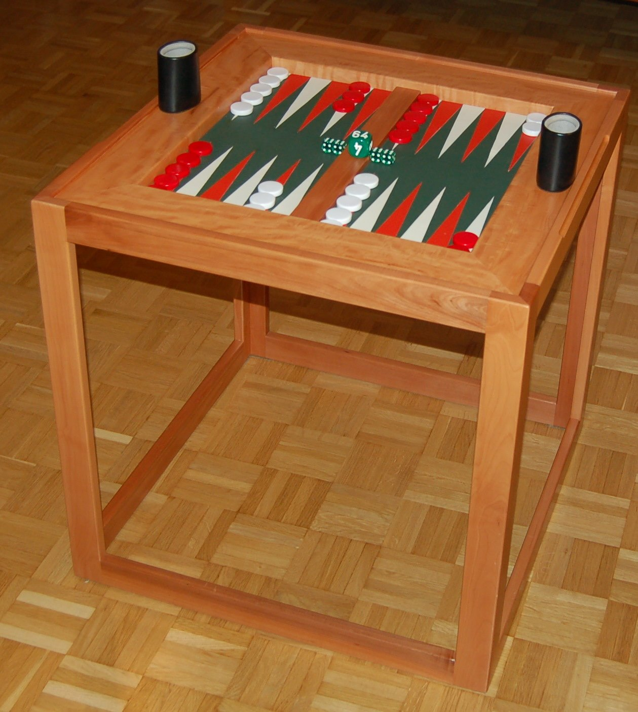 Moderner Backgammontisch aus Birnenholz mit Spielfläche aus Leder-Intarsia, Entwurf: Mag. art. Alois Scheicher